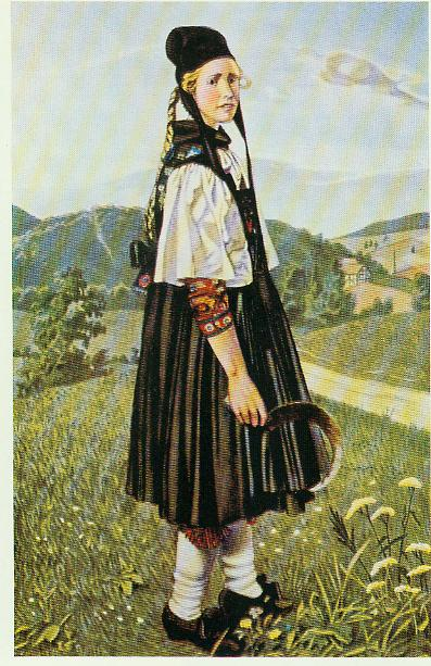 Erntetracht aus Wommelshausen, Obergericht Amt Blankenstein